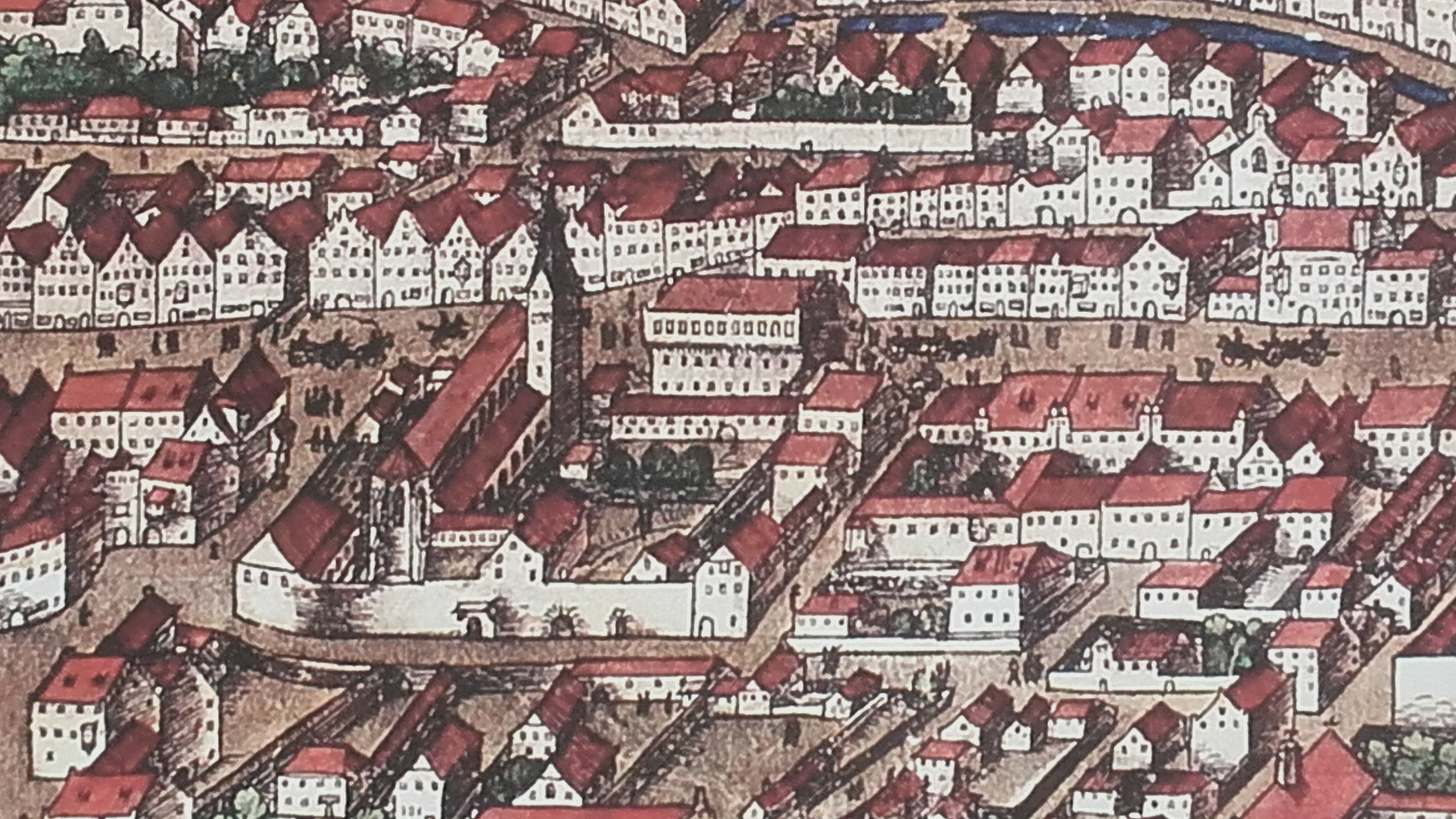 Ausschnitt aus dem Vogelschauplan von Jörg Seld